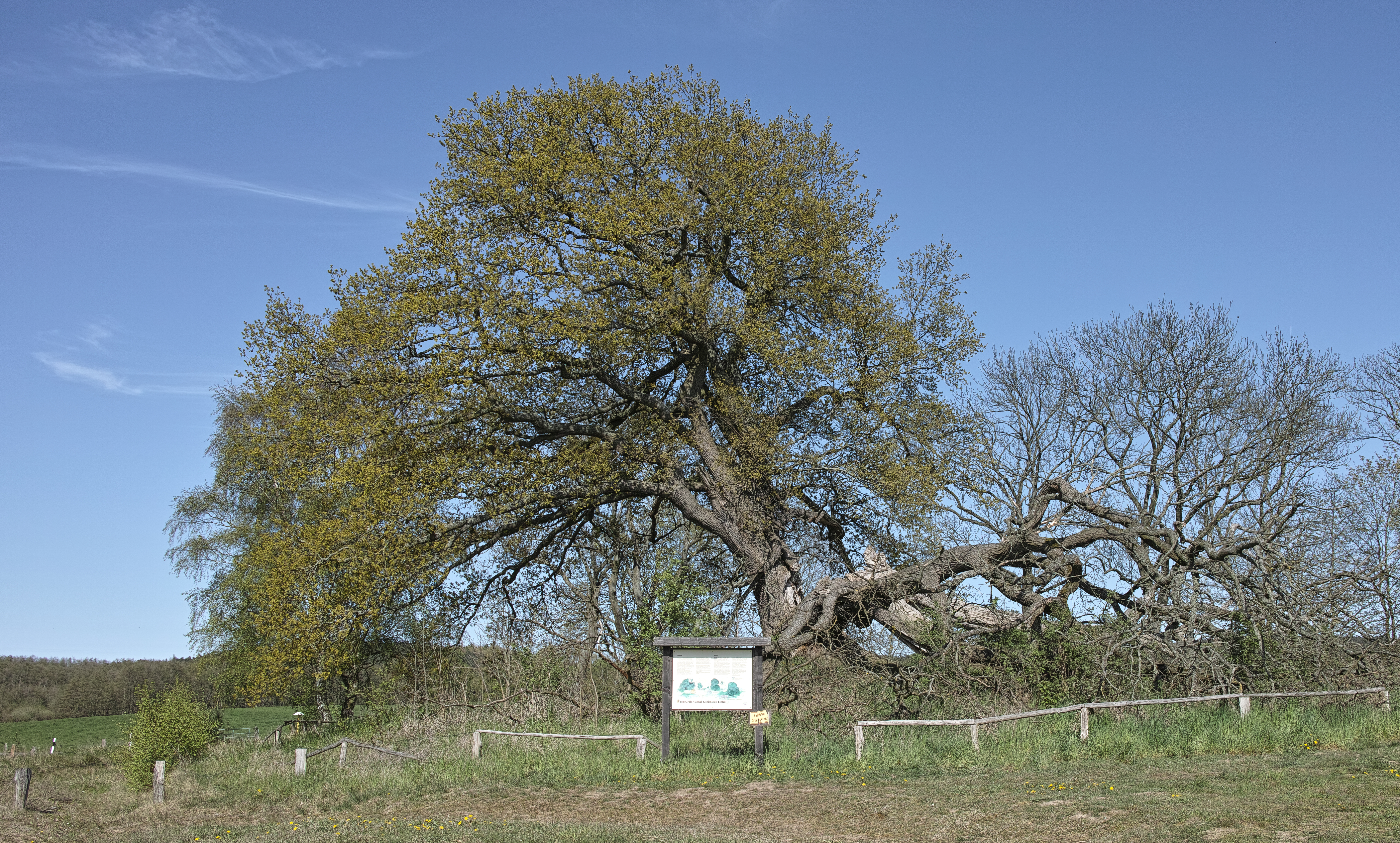 Suckower Eiche im Naturpark Insel Usedom 07.05.2017 Austrieb